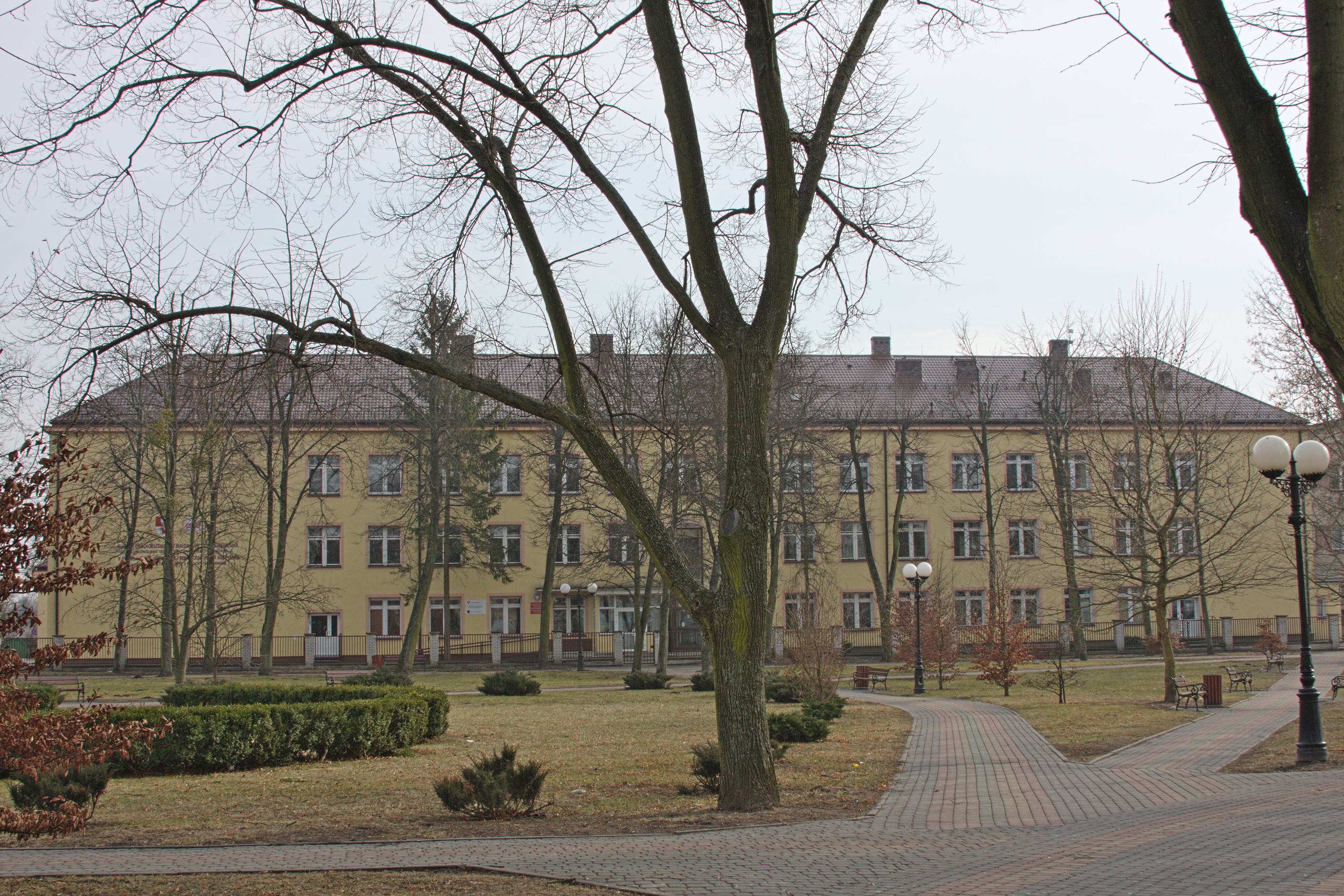 II Liceum Ogólnokształcące z BJN im. Bronisława Taraszkiewicza w Bielsku Podlaskim.